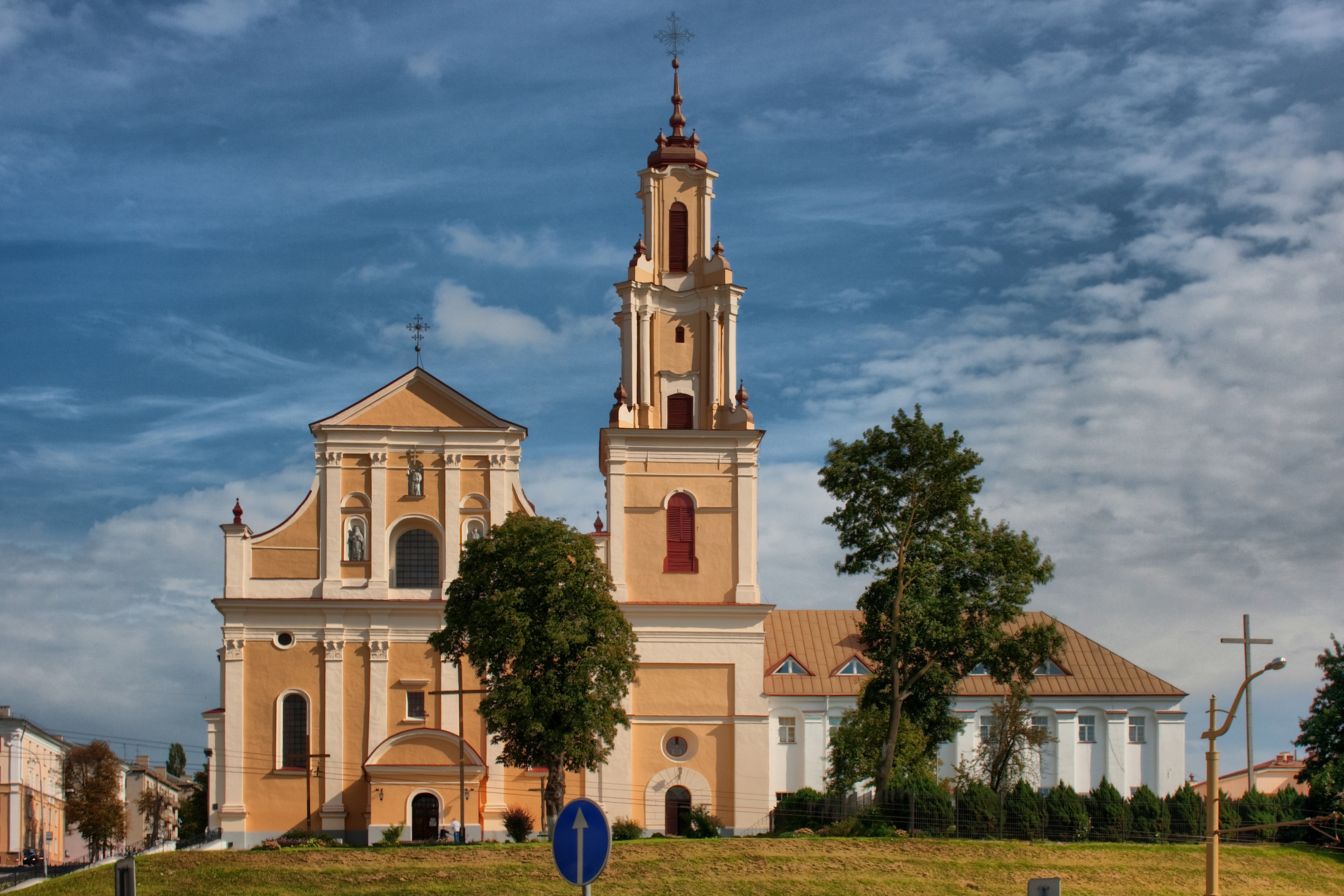 Беларуская (тарашкевіца): Ансамбль былога кляштара бернардзінцаў: касьцёл са званіцай дэкаратыўнае аздабленьне інтэр’ера касьцёла: галоўны алтар, восем алтароў, фрэскавыя кампазіцыі цэнтральнага нэфа, арнамэнтальныя росьпісы і лепка, барэльефныя кампазіцыі, хоры, рашотка і дзьверы бабінца, дэкор Ларэтанскай капэлы, расьпісныя дзьверы ў паўночным нэфе жылы корпус агароджа. г. Горадня This is a photo of Belarusian heritage monument. Reference number: 412Г000018 ( WLM)